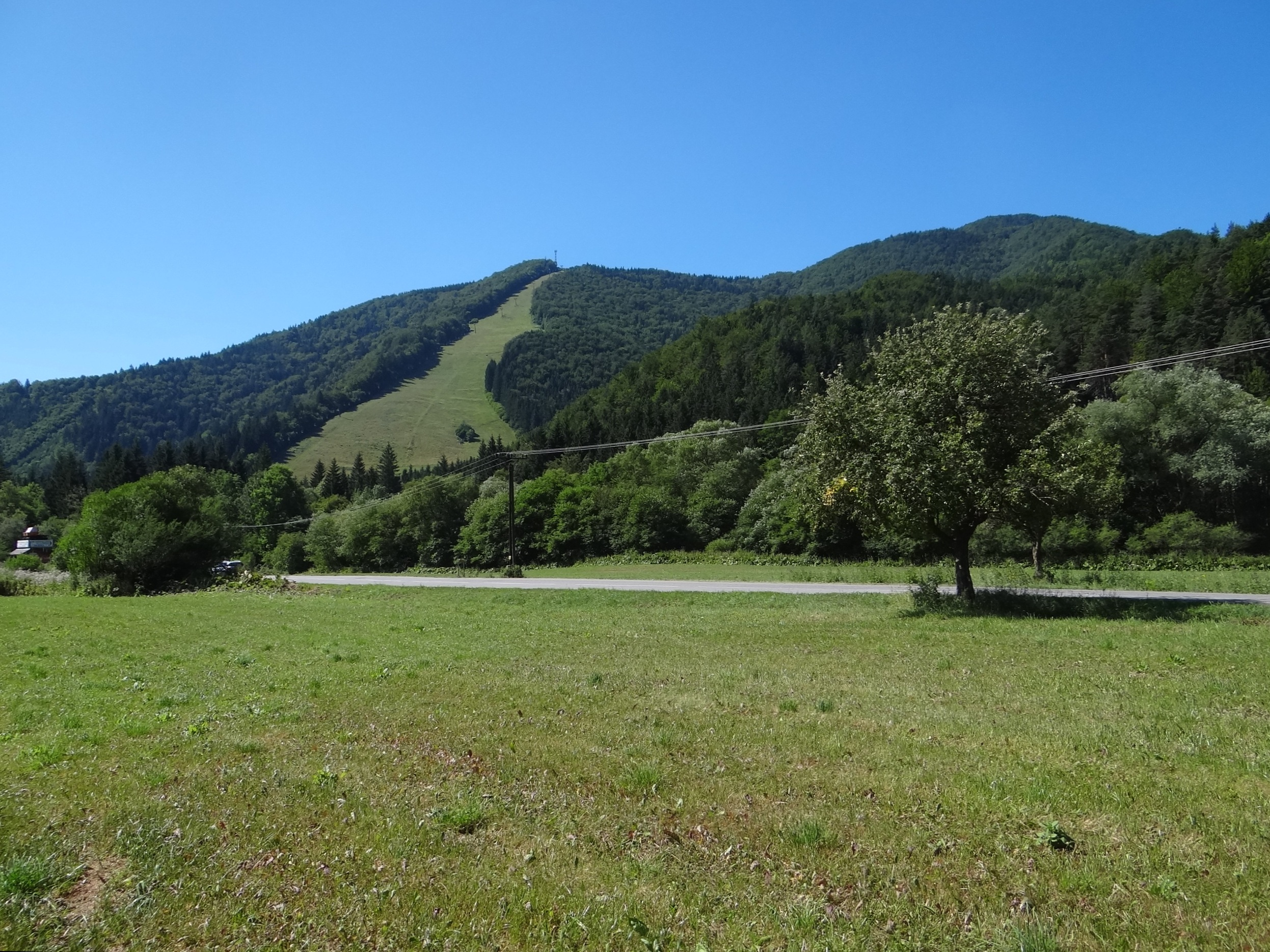 Magurka (Malá Fatra)